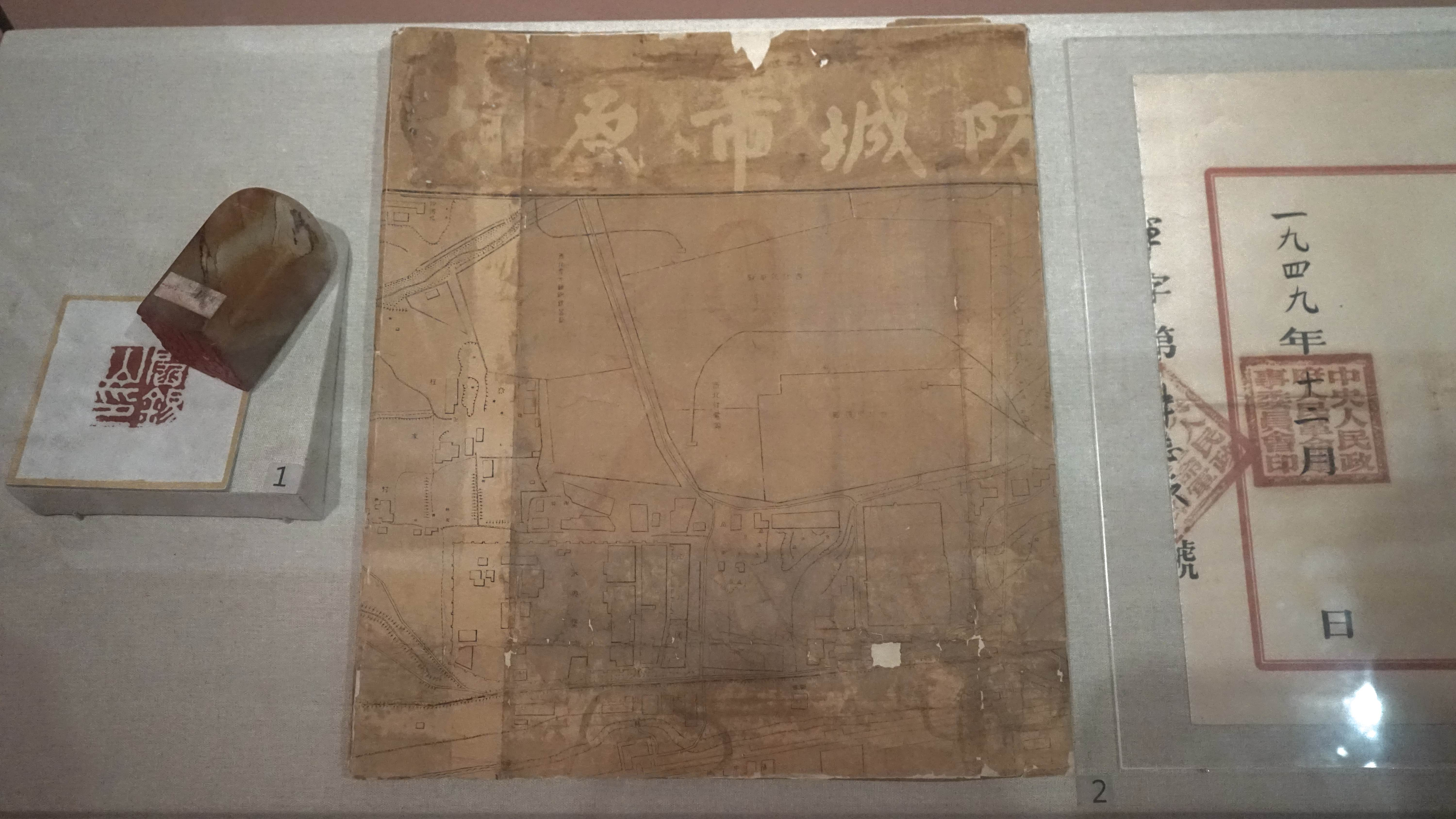 中文（中国大陆）: 太原前线司令部使用的国民党守军城防工事图。一级文物。